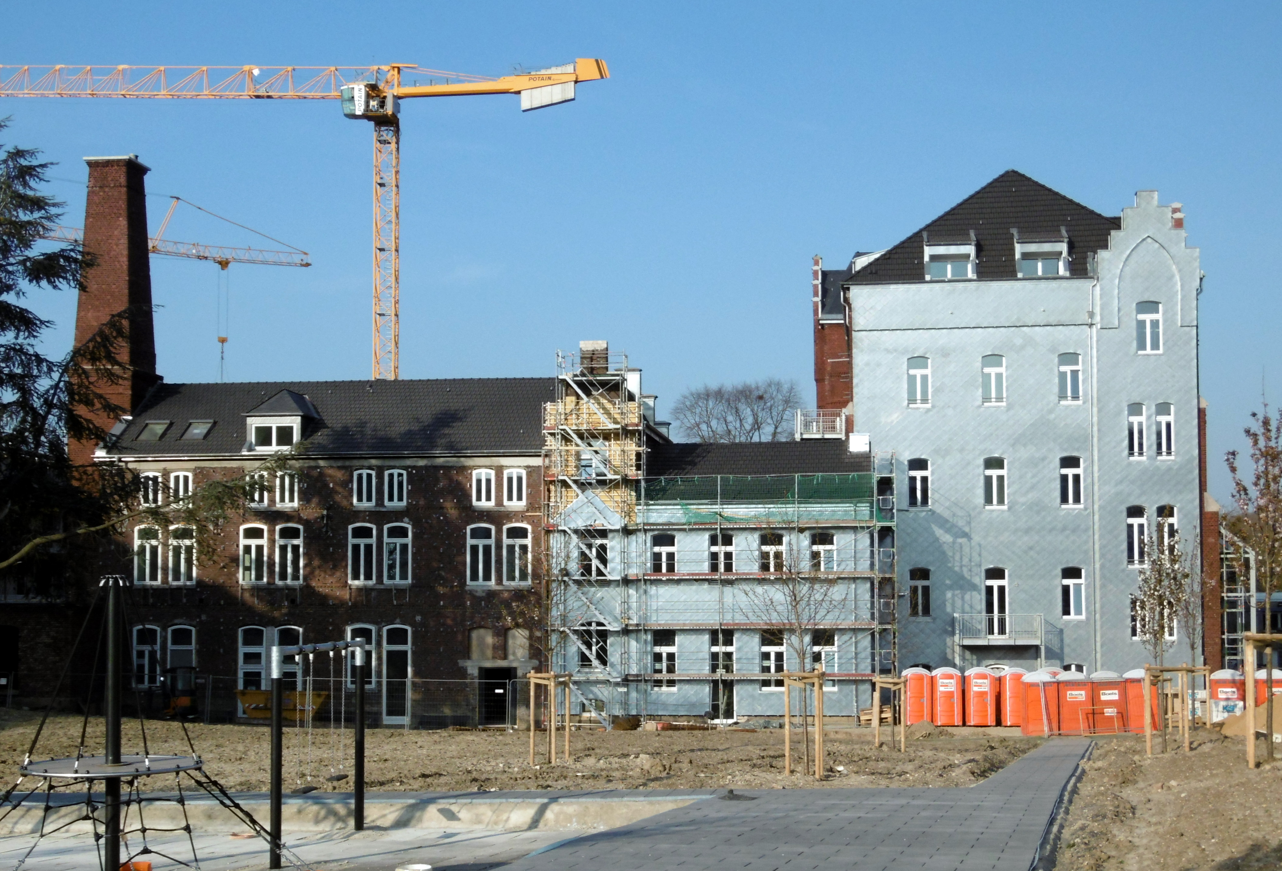 Zöglingshaus und Waschhaus des ehemaligen klsoters vom Guten Hirten (Zustand bei Restaurierung 2020)